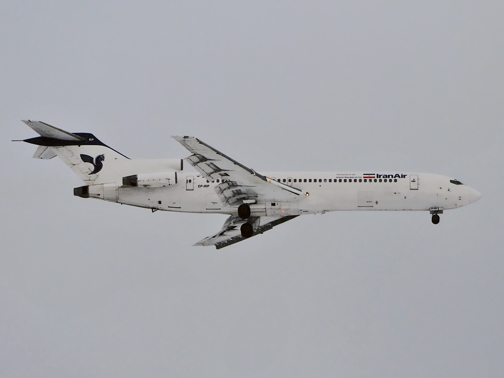 Борт, разбившийся 9 Января 2011 года в Иране. Снято 4 Января 2011 года за 5 дней до катастрофы